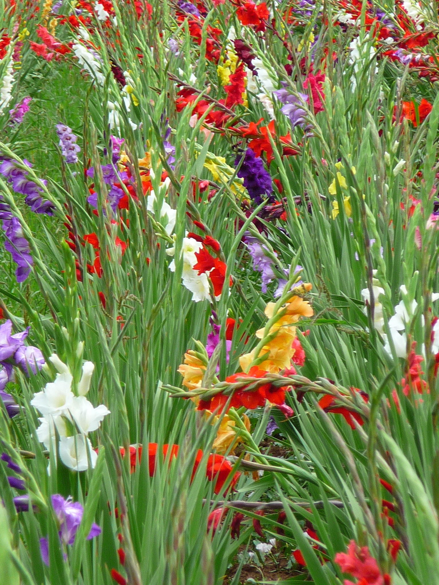 Feld mit Gartengladiolen (Gladiolus × hortulanus) nach einem Starkregen am Vorabend